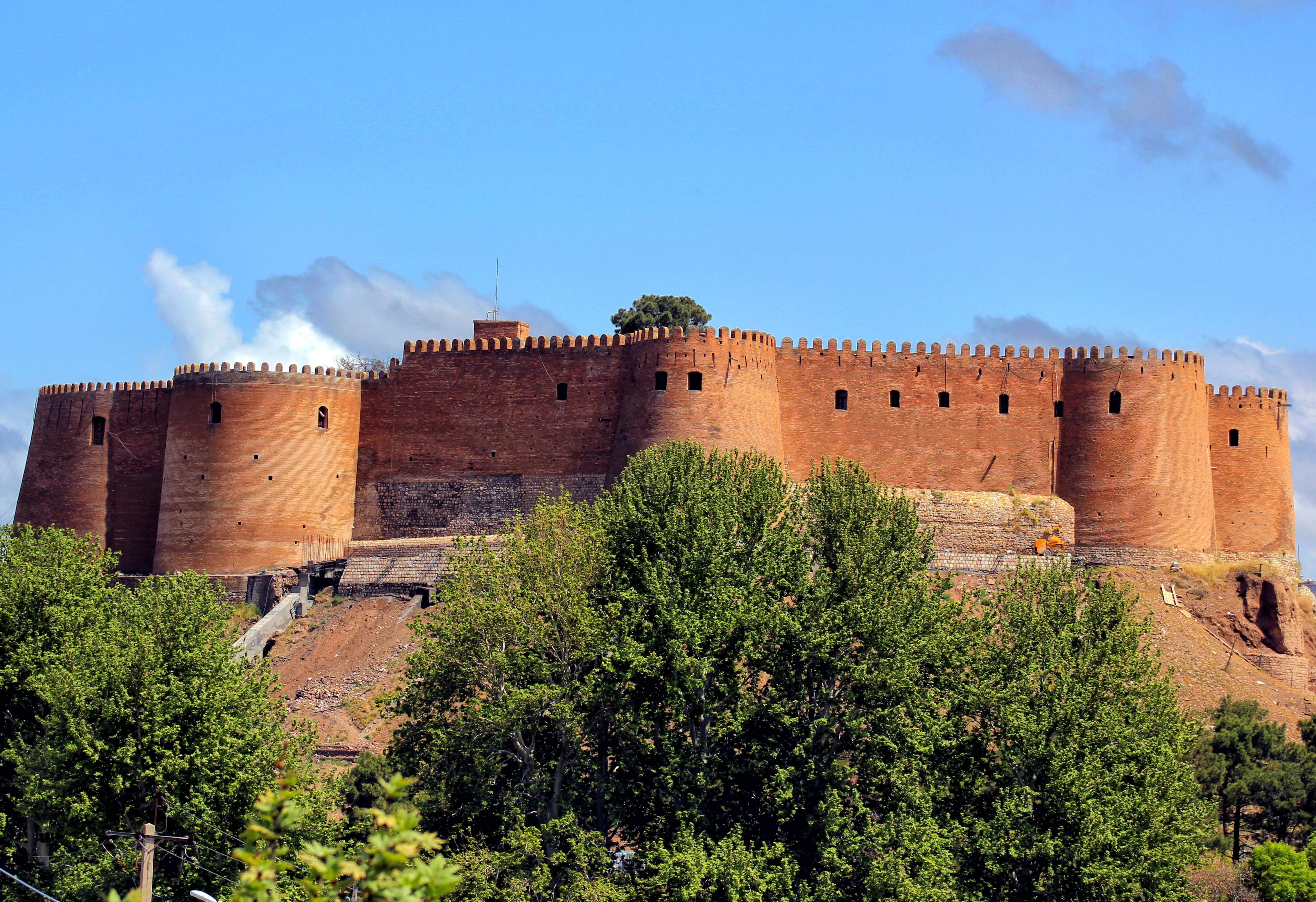 فلک الافلاک